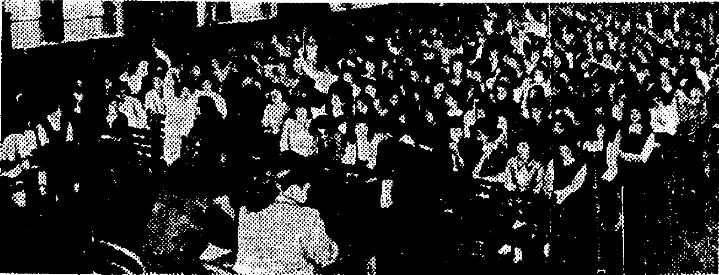 史上初のストを決行するお茶の水女子大学生